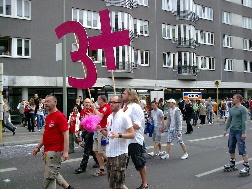 CSD Berlin 2009